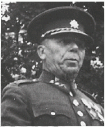 František Bláha (* 1886 - 1945) byl československý voják, generál a jeden z vrchních velitelů vojenské ilegální odbojové (protinacistické) organizace Obrany národa (ON). Po vypuknutí první světové války byl 23. listopadu 1914 odeslán na ruskou frontu, kde po šesti dnech padl do zajetí. Do československých legií vstoupil 30. června 1916. Zúčastnil se bojů u Marianovky a Jekatěrinburgu. Do nově vzniklého Československa se dostal 1. června 1921 a v prvorepublikové armádě prošel mnoha velitelskými funkcemi. Po okupaci Čech a Moravy německou armádou se v řadách Obrany národa zapojil do odboje. Po zatčení (22. června 1944) generála Zdeňka Nováka (stál v čele tzv. třetí garnitury ON) jej generál František Bláha nahradil v čele této organizace. Ve spolupráci s příslušníky výsadku Barium vybudoval ve východních Čechách mobilizační síť počítající s vytvořením čtyř divizí a jejich nasazením po přiblížení se fronty. Dne 17. listopadu 1944 byl František Bláha zatčen gestapem a uvězněn v Malé pevnosti v Terezíně. Svoji veliteksou funkci v ON tedy vykonával od června 1944 do listopadu 1944, kdy byl vystřídán generálem Františkem Slunečkem (krycí jméno Alex). V Malé pevnosti Terezín se sice František Bláha dožil osvobození Československa, ale zemřel při epidemii tyfu 21. května 1945. Foto před rokem 1945. Autor fotografie není znám.